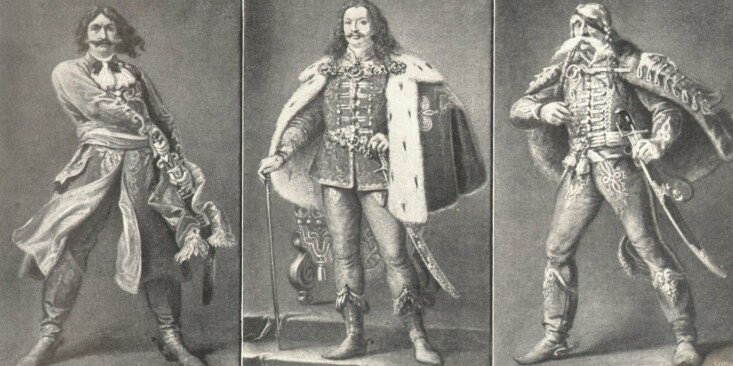 Madarász Viktor - Rákóczi, Bercsényi, Vak Bottyán Hármas alak egy keretben, a Rákóczi kort jelző triptichon